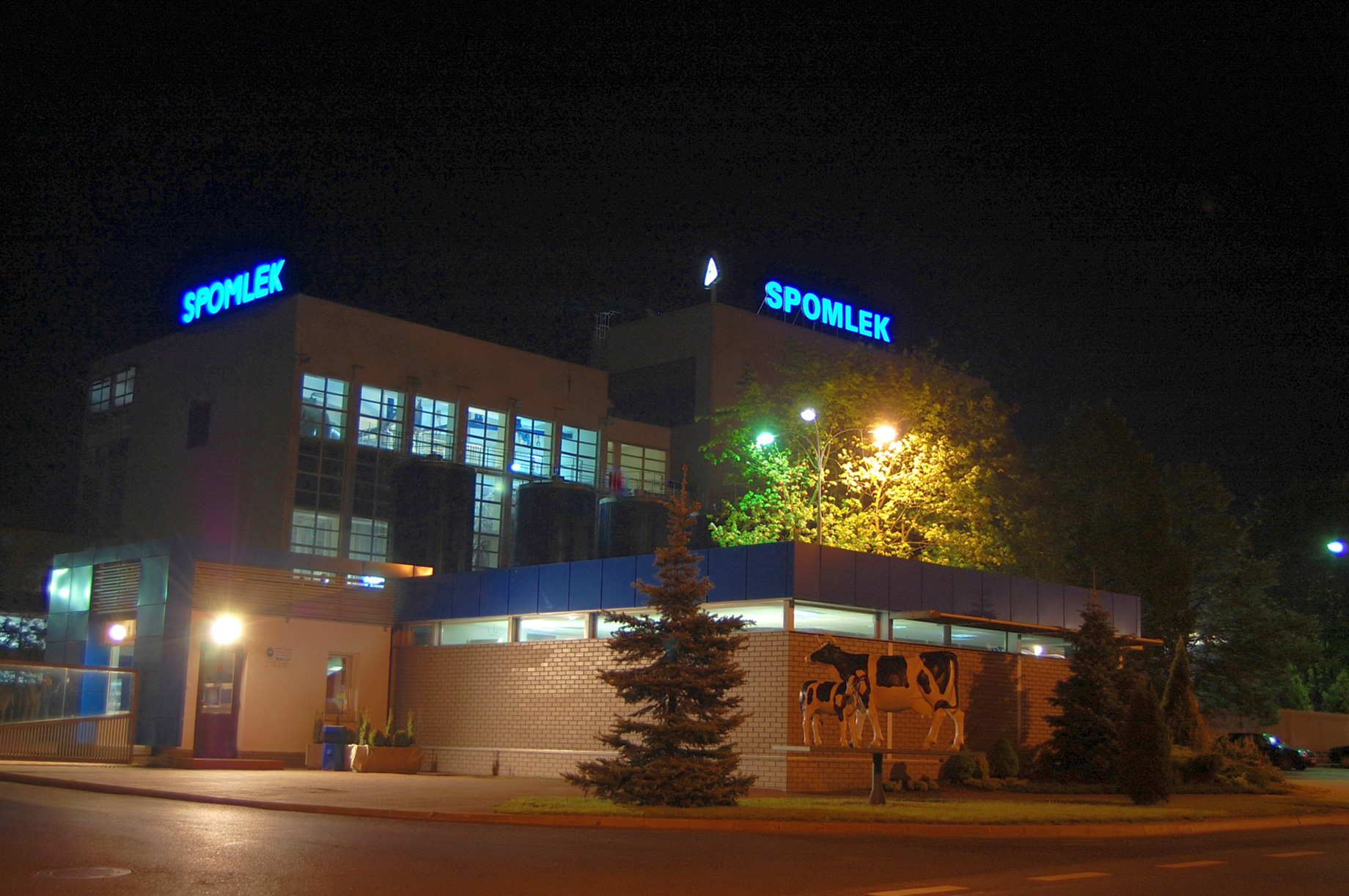 Radzyń Podlaski Spółdzielnia mleczarska "Spomlek"